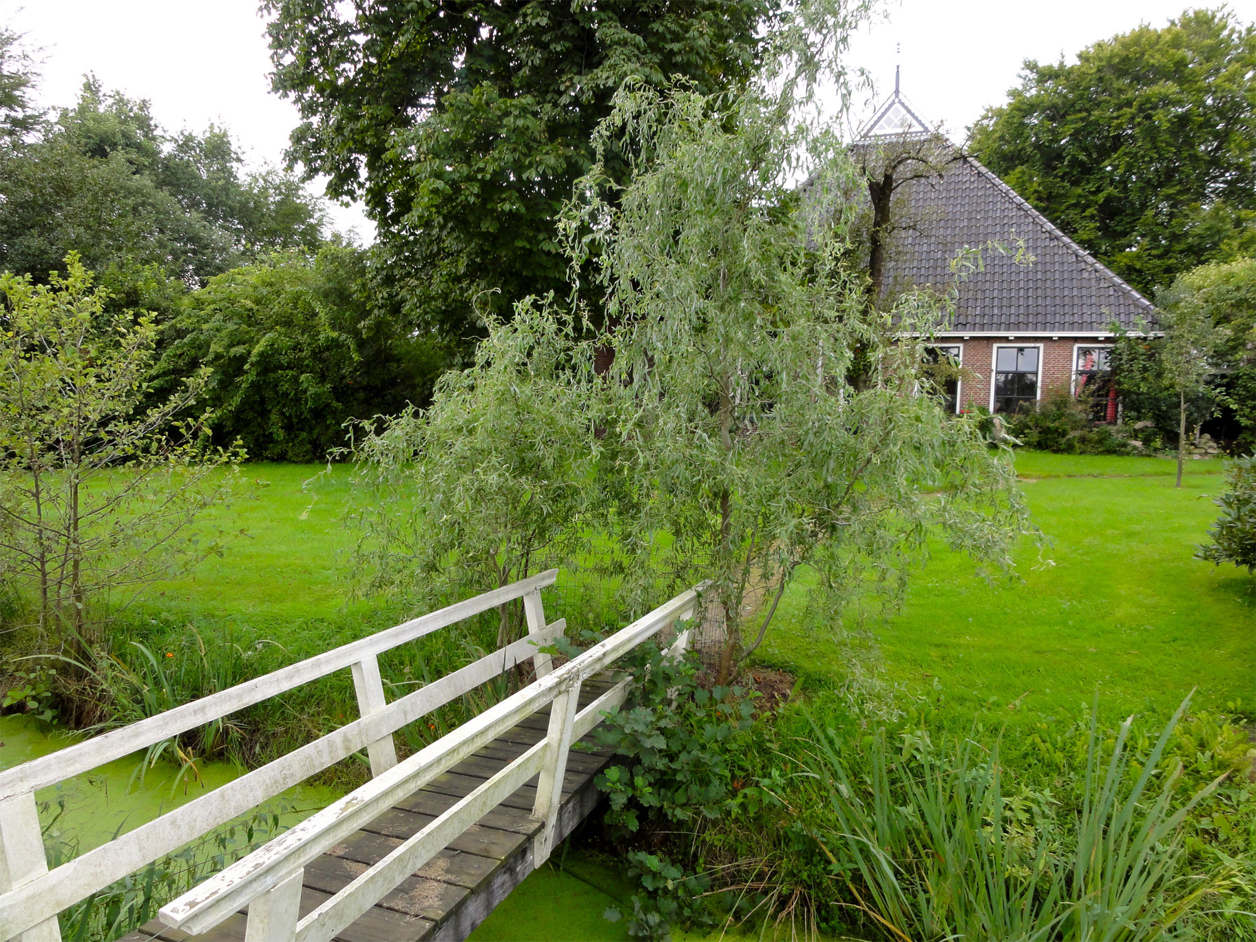 Skûlenburgerwei 5, It Heechsân